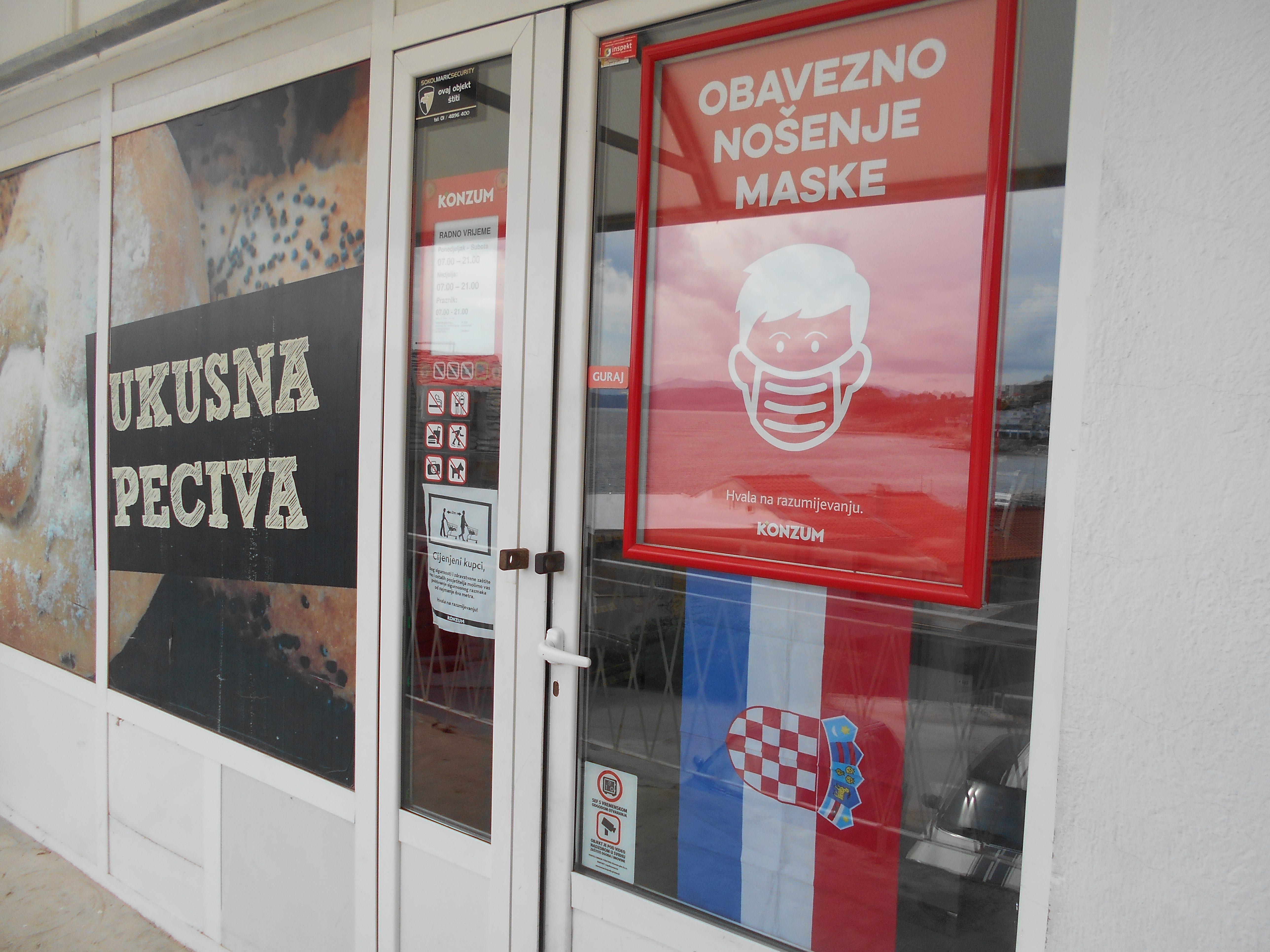 Upozornění na povinnost nosit roušky v obchodě v Drašnici